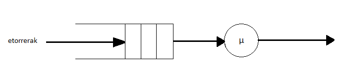 The M/M/1 queueing system.